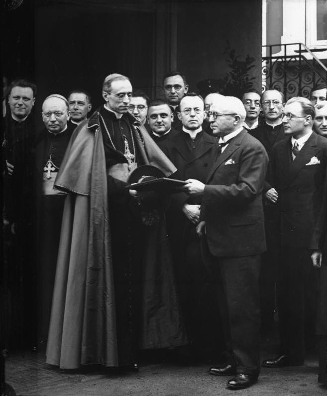 Der päpstliche Nuntius Kardinal Pacelli in Rüsselsheim ! Der päpstliche Nuntius Kardinal Pacelli wurde durch Geheimrat von Opel die Schenkungsurkunde einer Pullmann- Limousine feierlich überreicht. Unser Bild zeigt die feierliche Überreichung der Schenkungsurkunde an den päpstlichen Nuntius Kardinal Pacelli durch Geheimrat von Oppel.